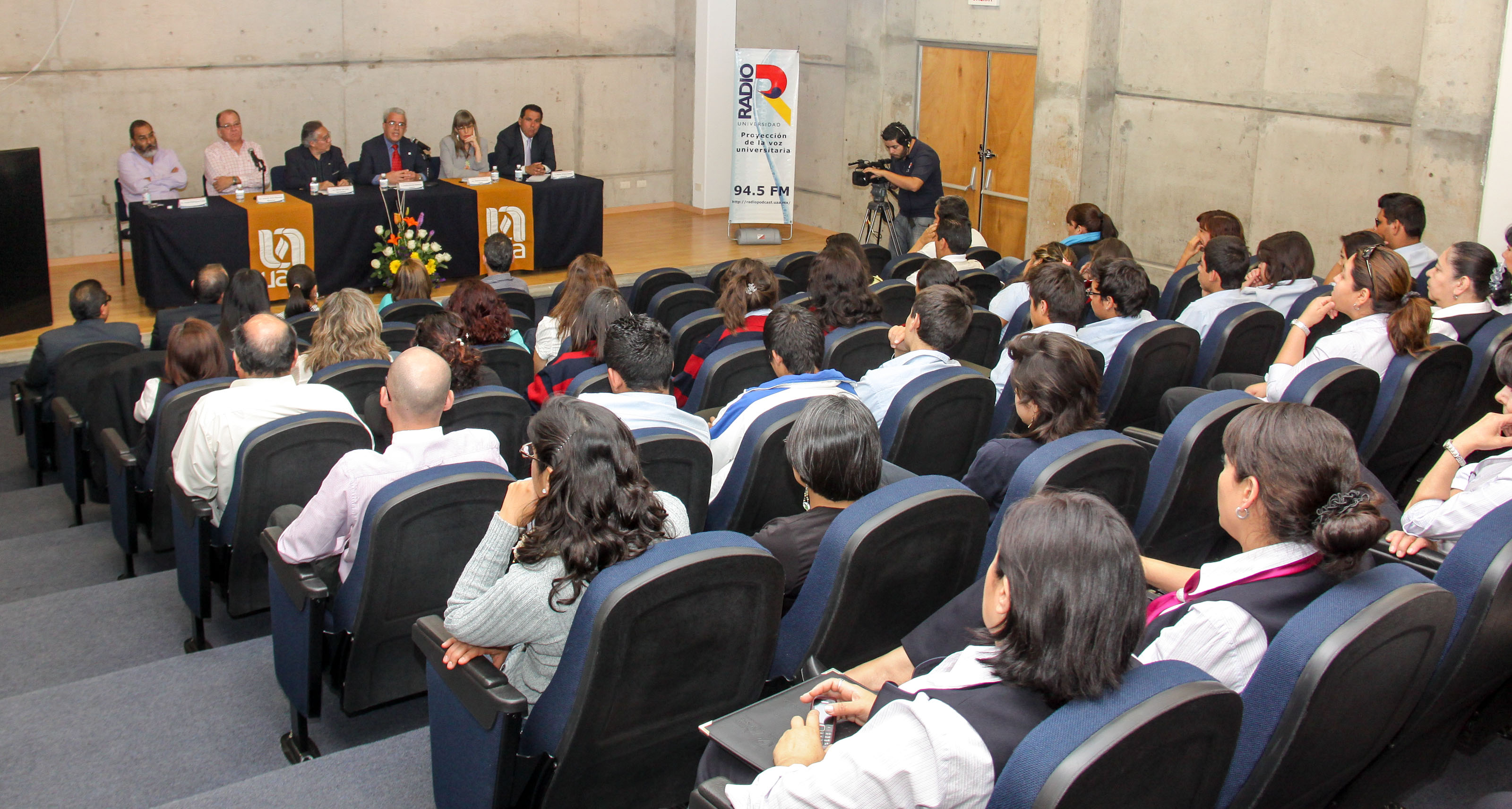 Grupo de especialistas invitados para hablar de un tema específico.